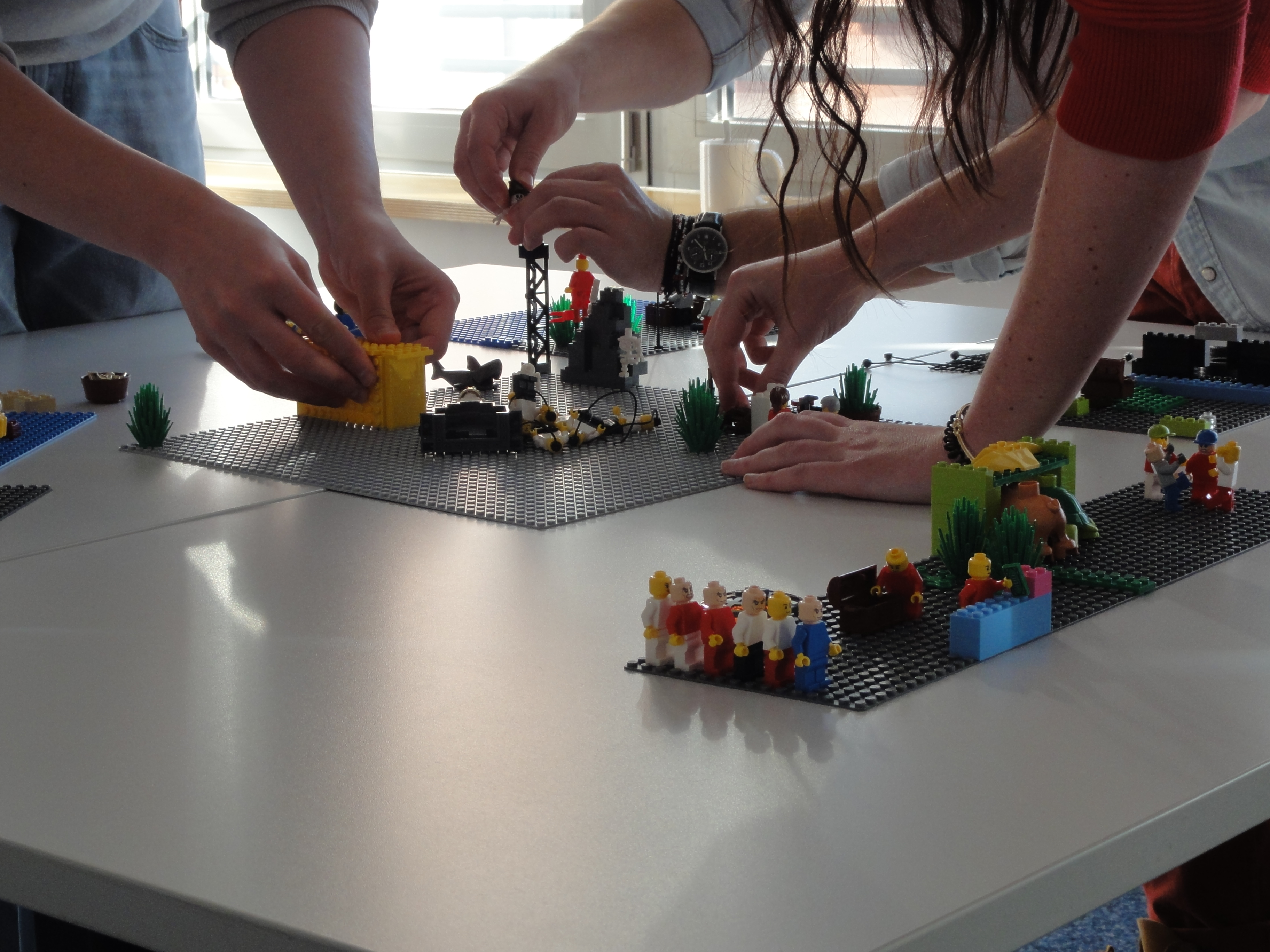 The facilitated LSP process combines the advantages of playing and modeling with Lego bricks, with the demand of the business world.